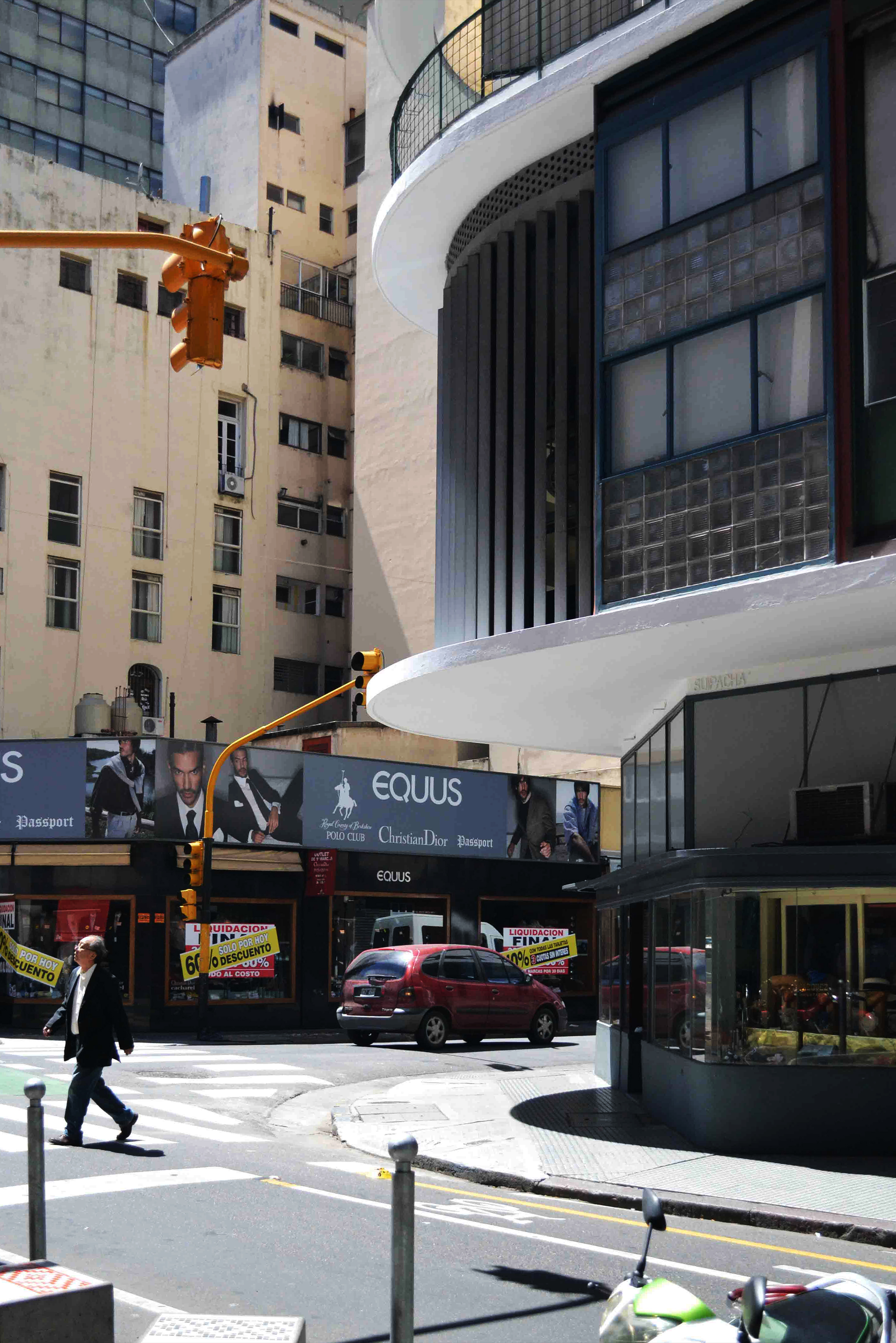 Las líneas rectoras del proyecto, marcadas por las losas, llegan hacia la esquina, resolviendo el encuentro de la perpendicularidad con una curva